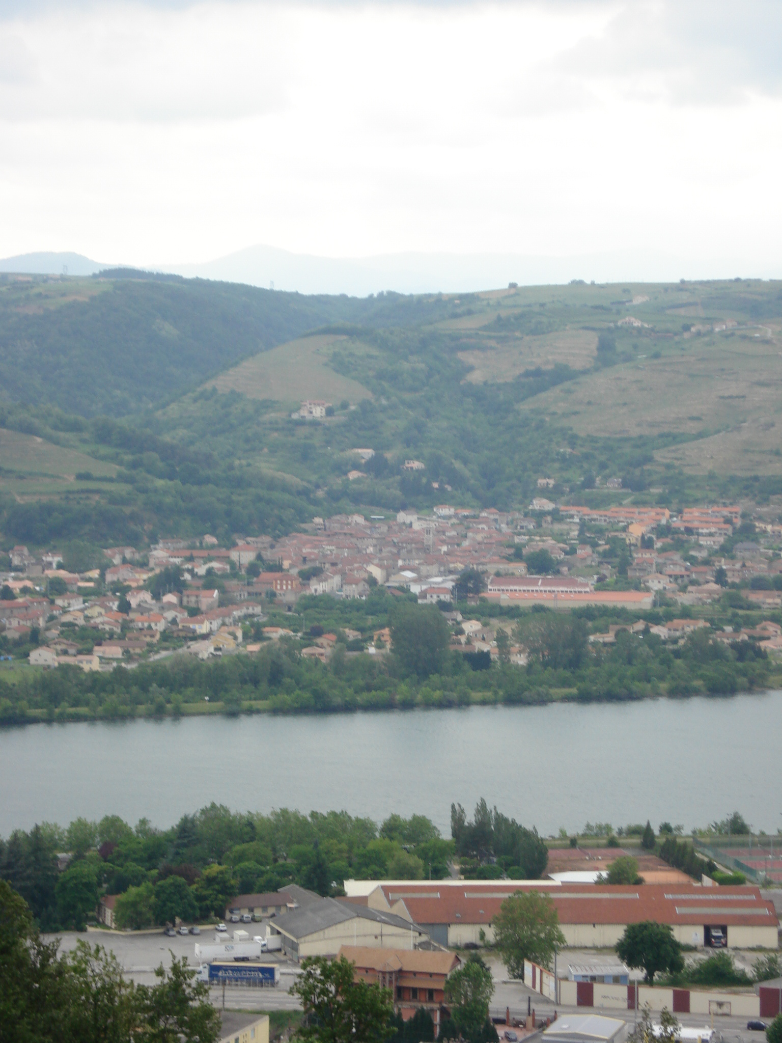 Sarras (Ardèche) au bord du Rhône; Saint Vallier au premier plan.